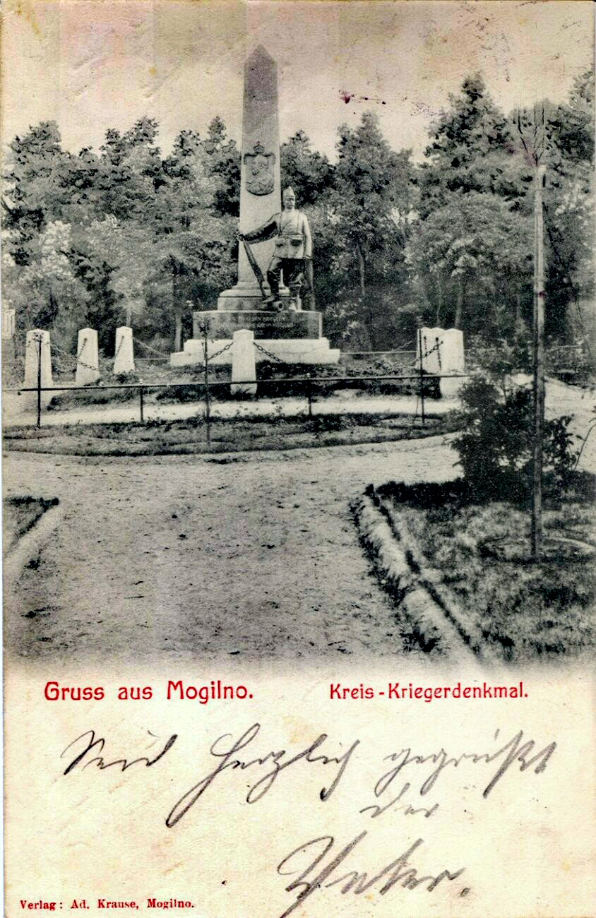 Das Kriegerdenkmal 1870/71 in MOGILNO/ Provinz Posen. Am Denkmal ist ein Reliefmedaillon Kaiser Wilhelms I. zu sehen, davor steht ein preußischer Jäger mit Gewehr. Die Inschrift am Sockel weist den Kreis Mogilno als Stifter im Jahr 1903 aus.